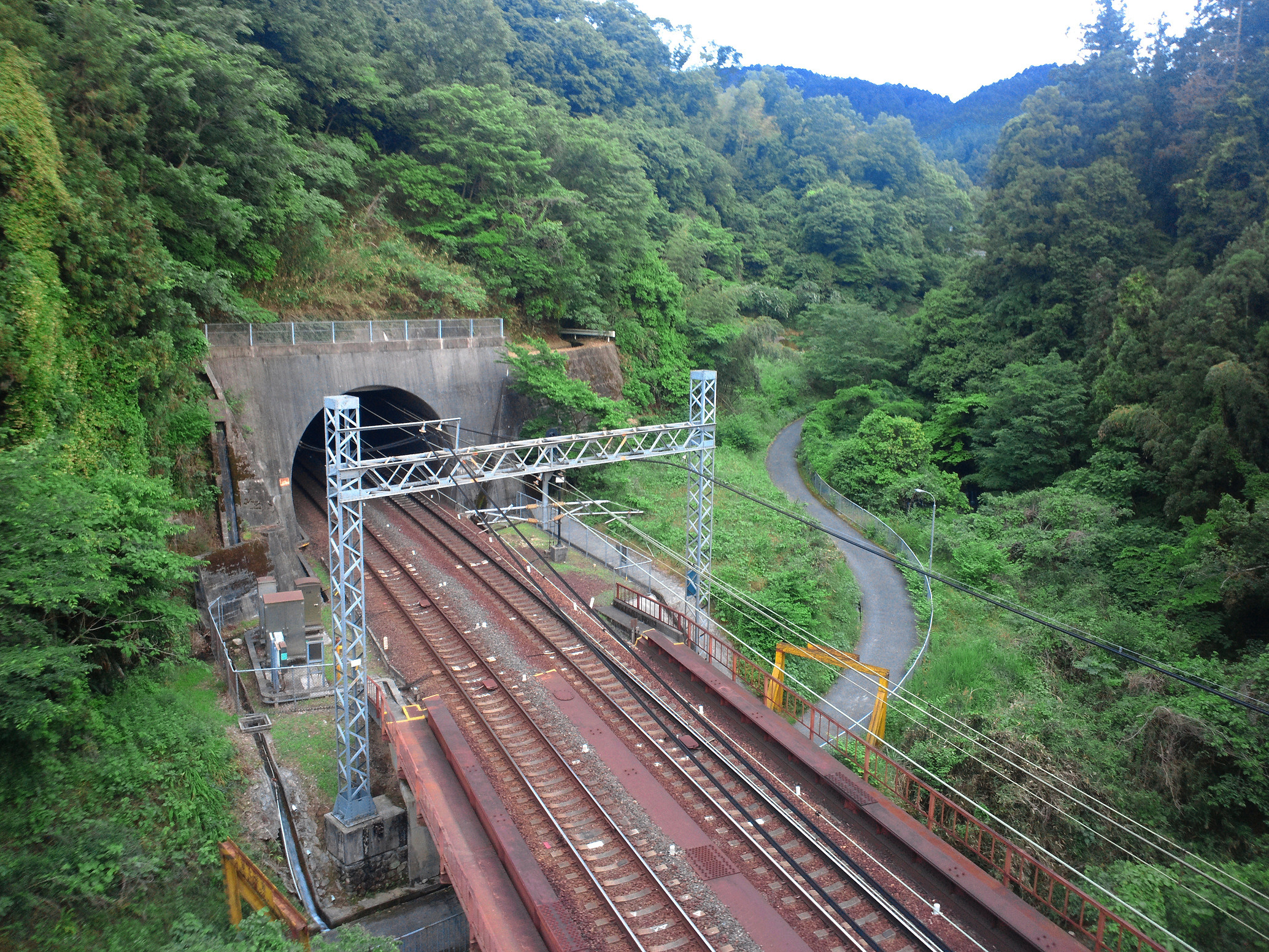 南海美加の台駅より高野山方面